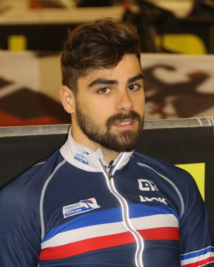 Thomas Denis, französischer Radsportler